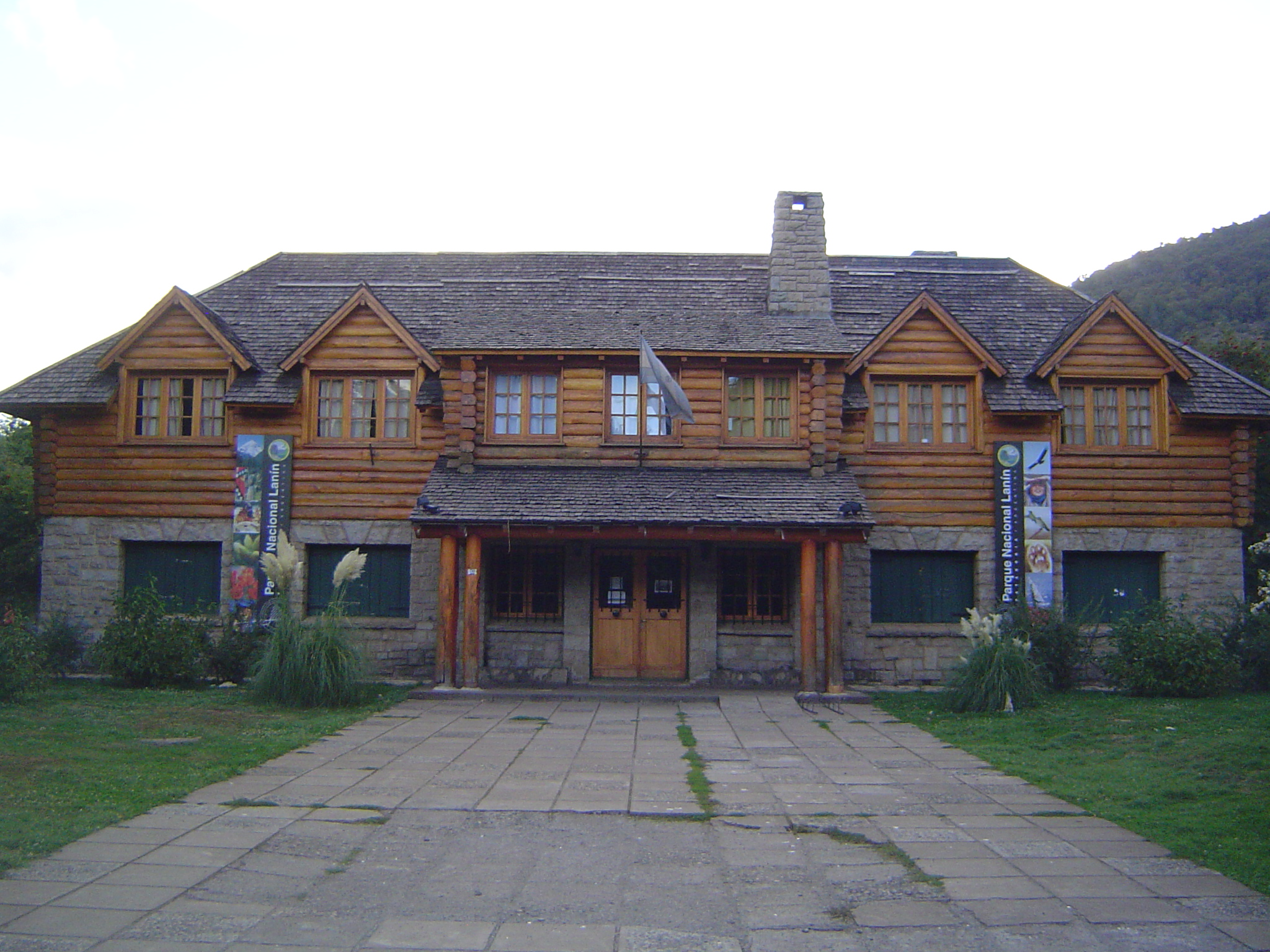 Edificio de la Intendencia del Parque Nacional Lanín. En la ciudad de San Martín de los Andes. Inaugurado en 1946 [1].